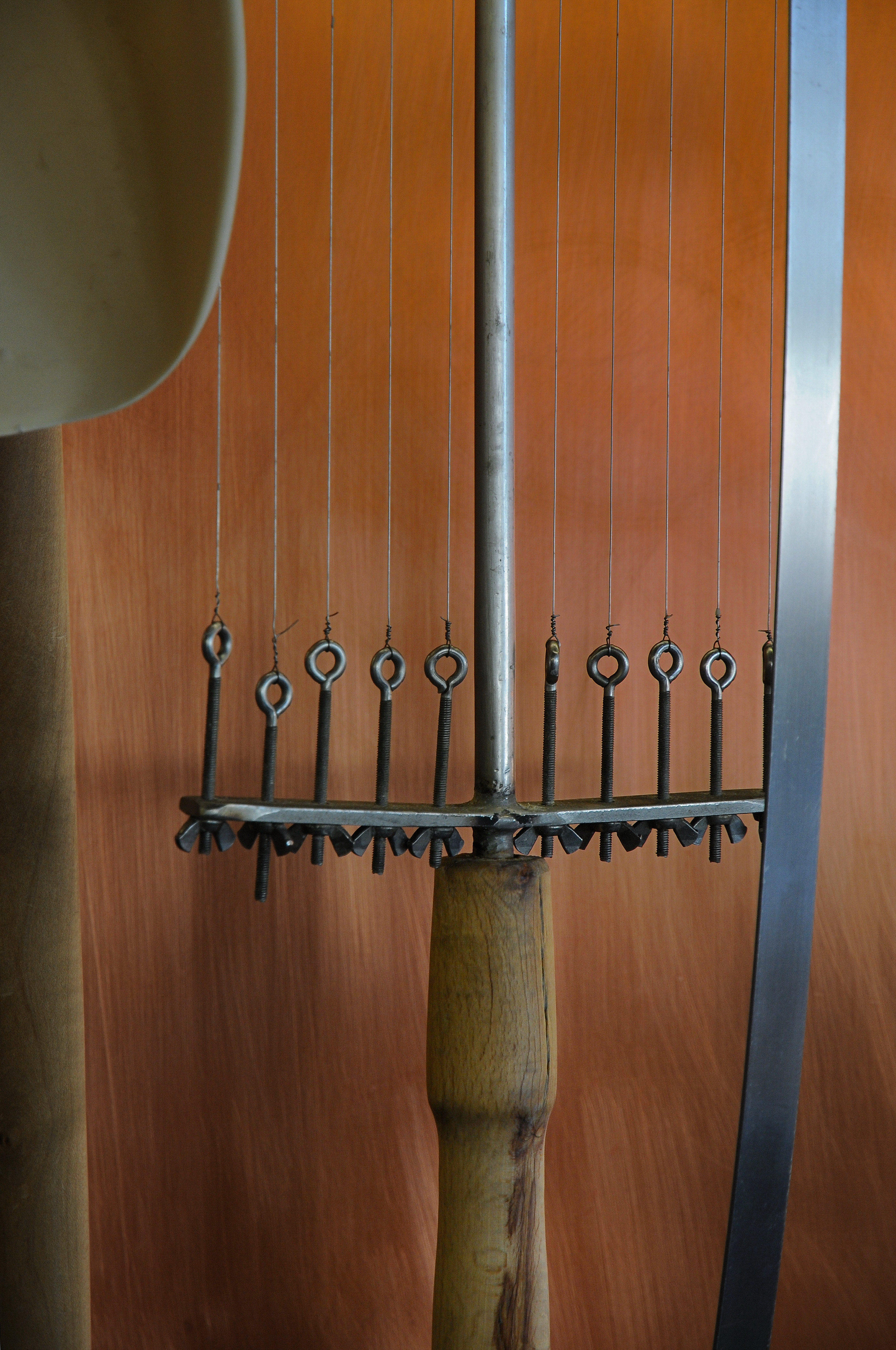 Die Käseharfe ist ein Werkzeug, das bei der Käseherstellung benutzt wird. Mit ihr wird die eingedickte Milch zum sogenannten "Bruch" zerteilt. Gesehen im Käsehaus in Andelsbuch.